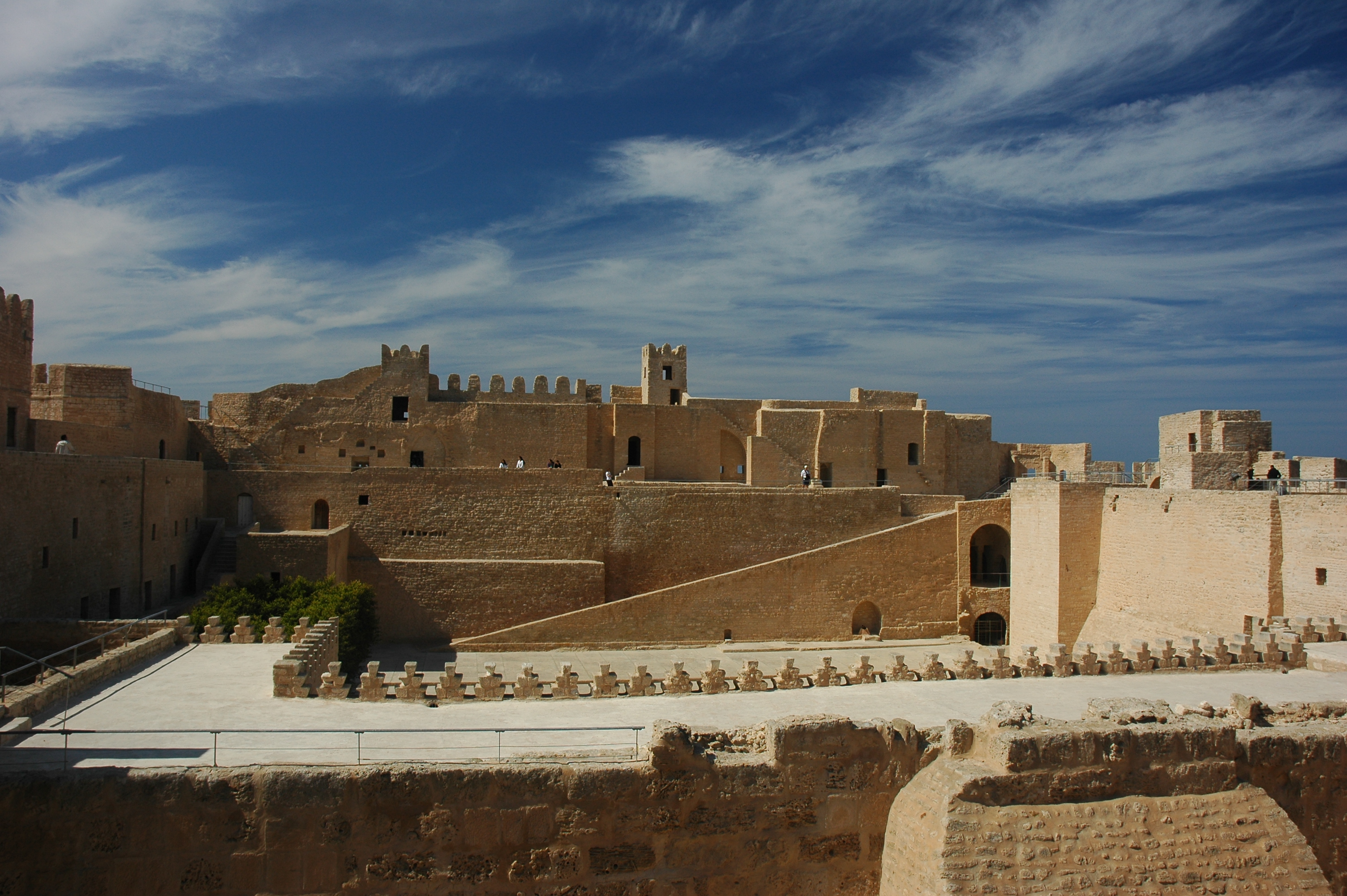 Ribat de Monastir en Tunisie